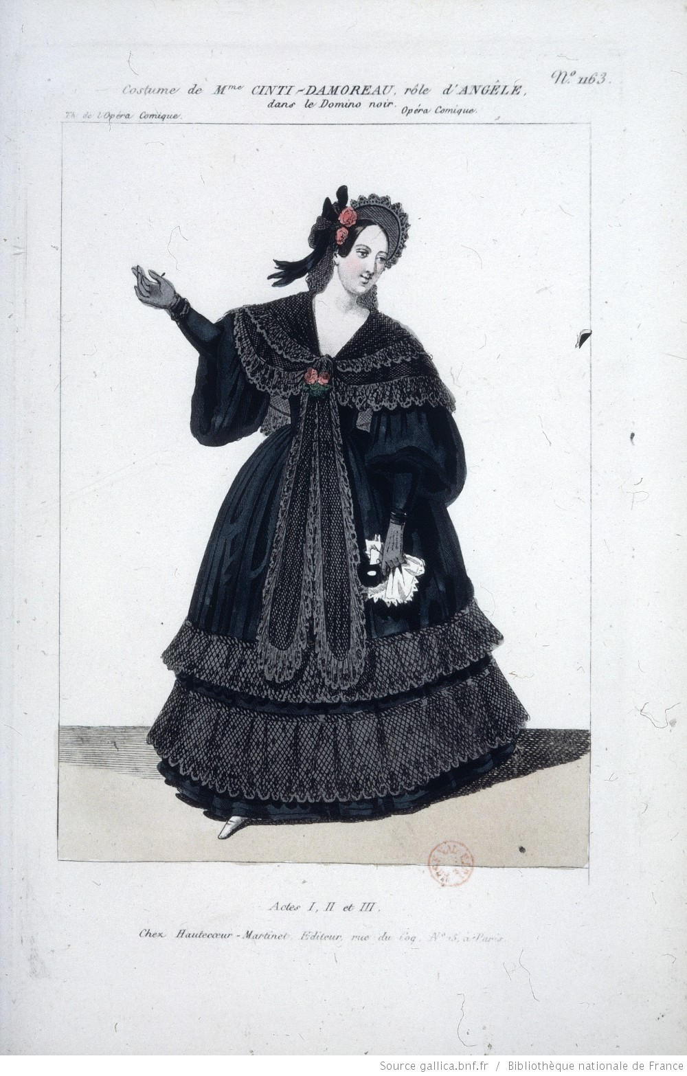 Costume de Mme Cinti-Damoreau (rôle d'Angèle) à l'acte 1 de l'opéra Le Domino Noir de Auber.